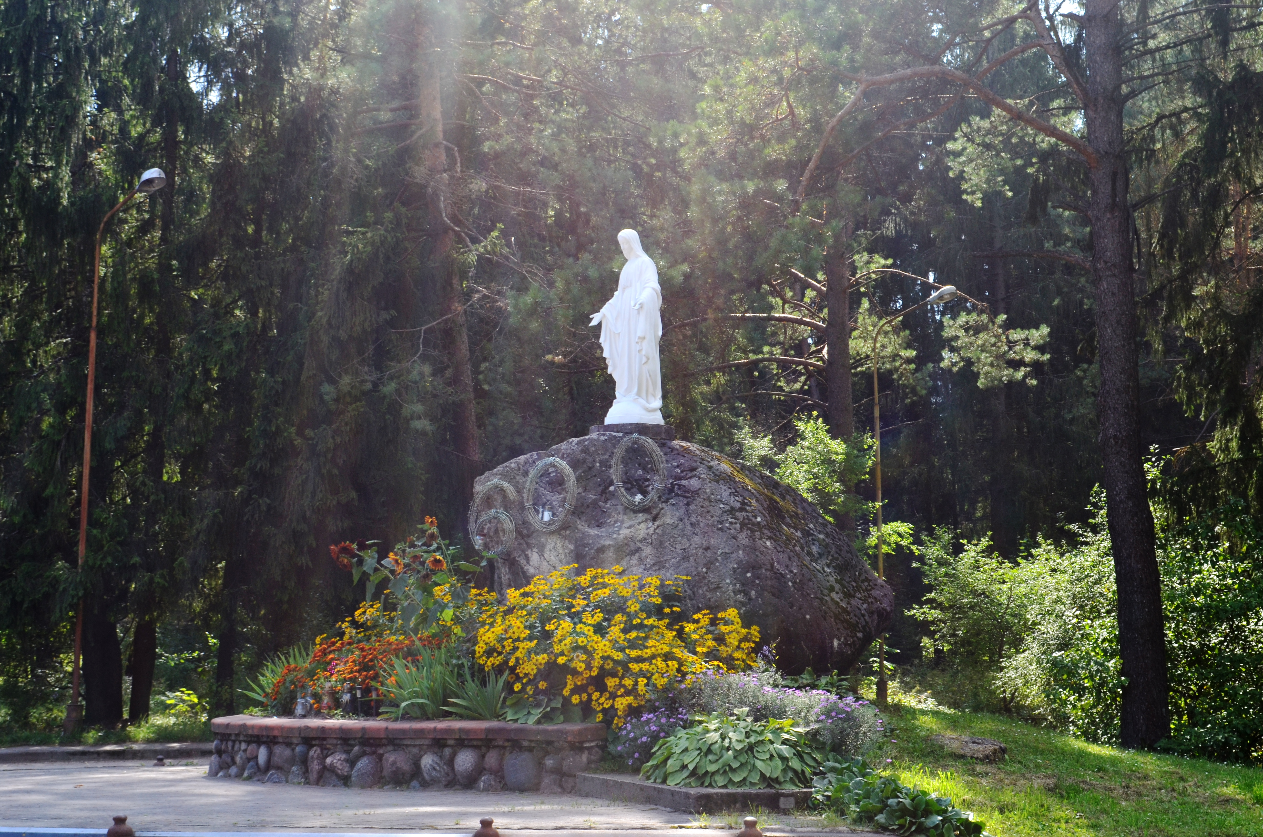 Marijos skulptūra Jašiūnuose, Šalčininkų raj.